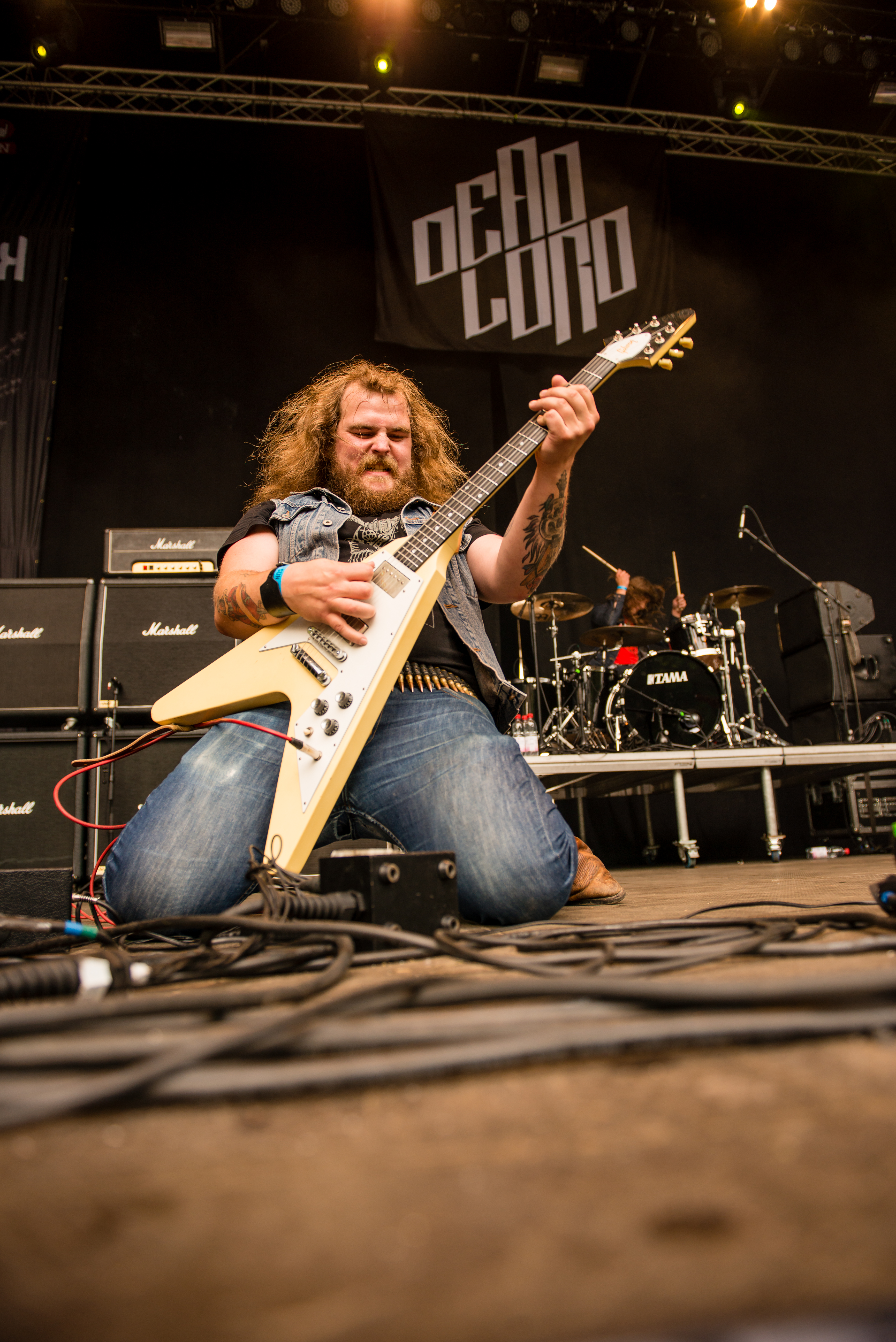 'Turock Open Air 2014 - Essen': 'Dead Lord'